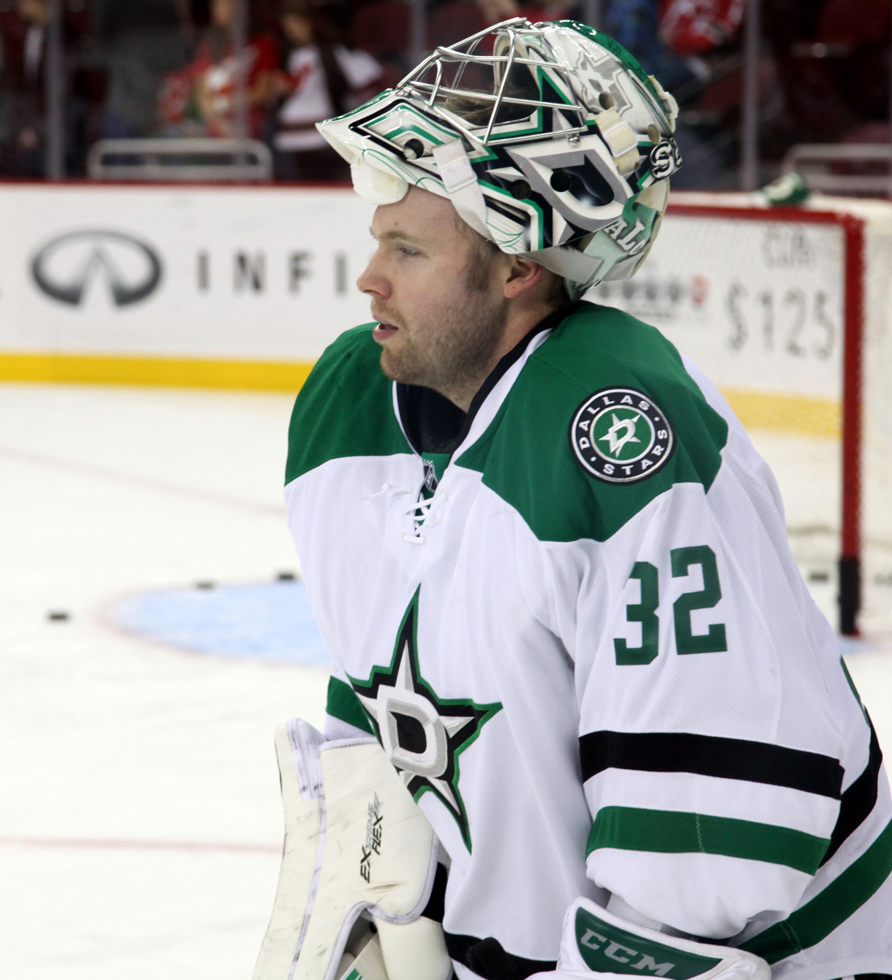 Kari Lehtonen in October 2014.